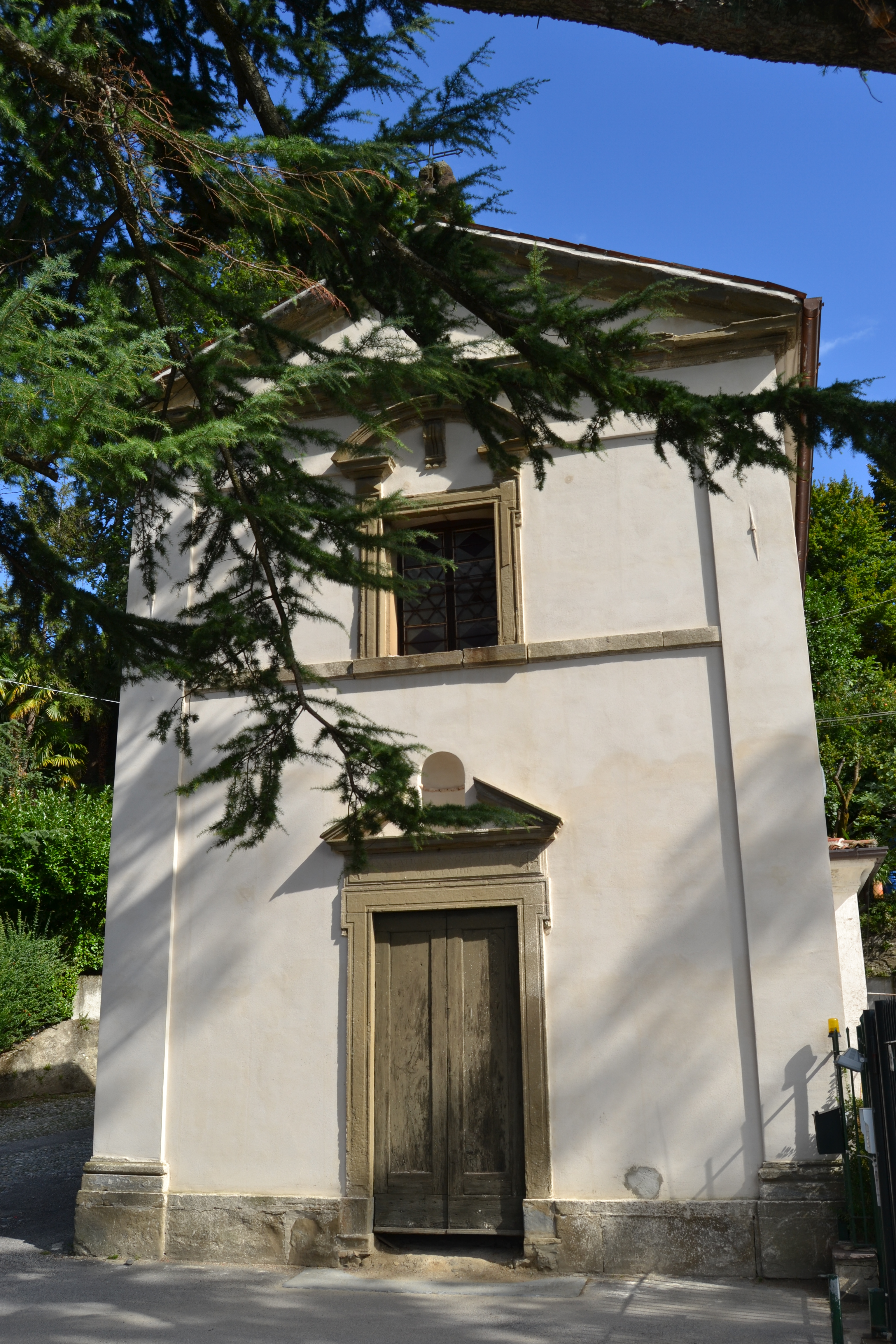 Chiesa dedicata a Santa Marzia in località Molinatto